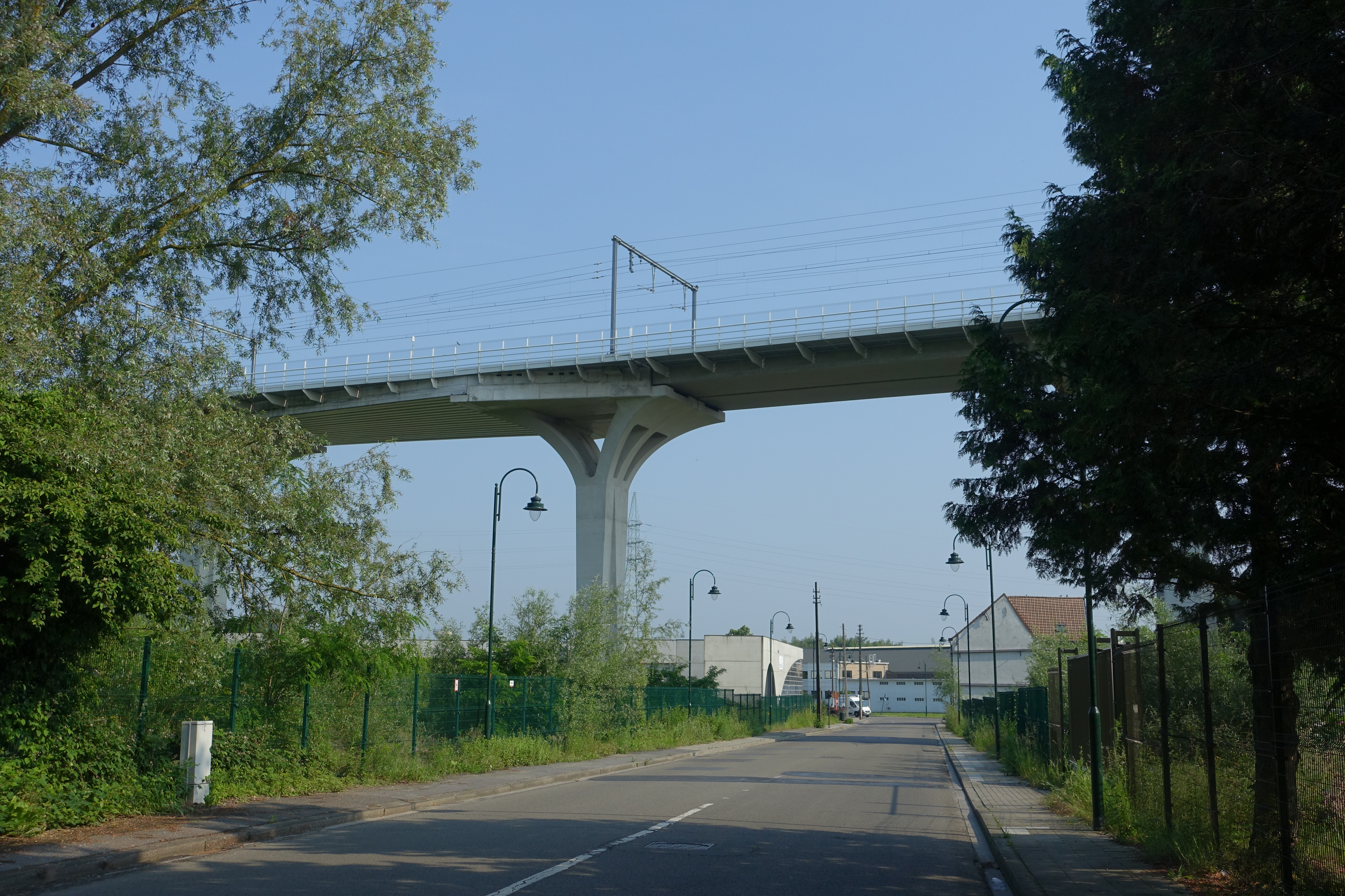 Viaduct van spoorlijn 25N ten noorden van Haren